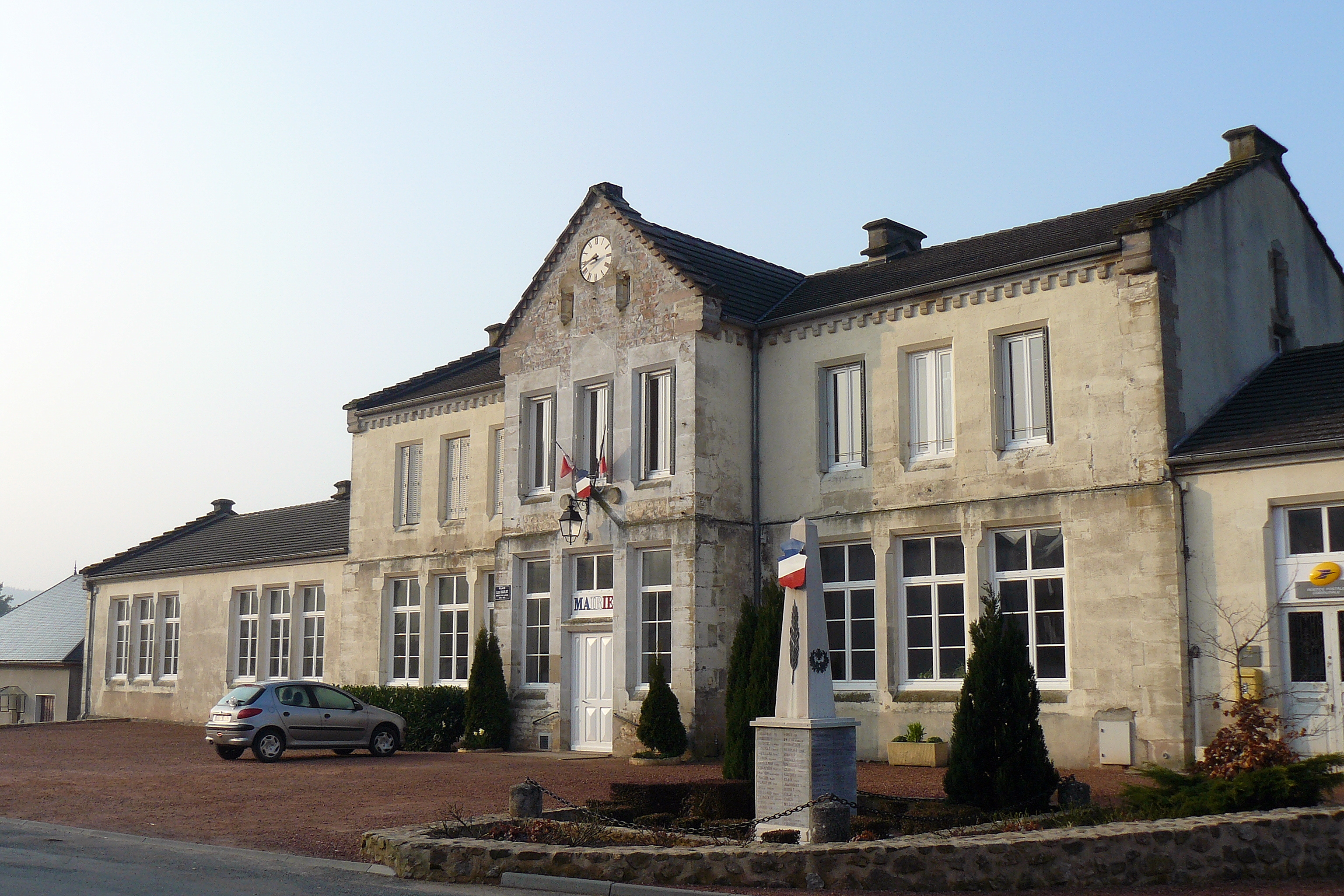 Cussy-en-Morvan (Saône-et-Loire, France) : la mairie, construite par l'architecte Dulac